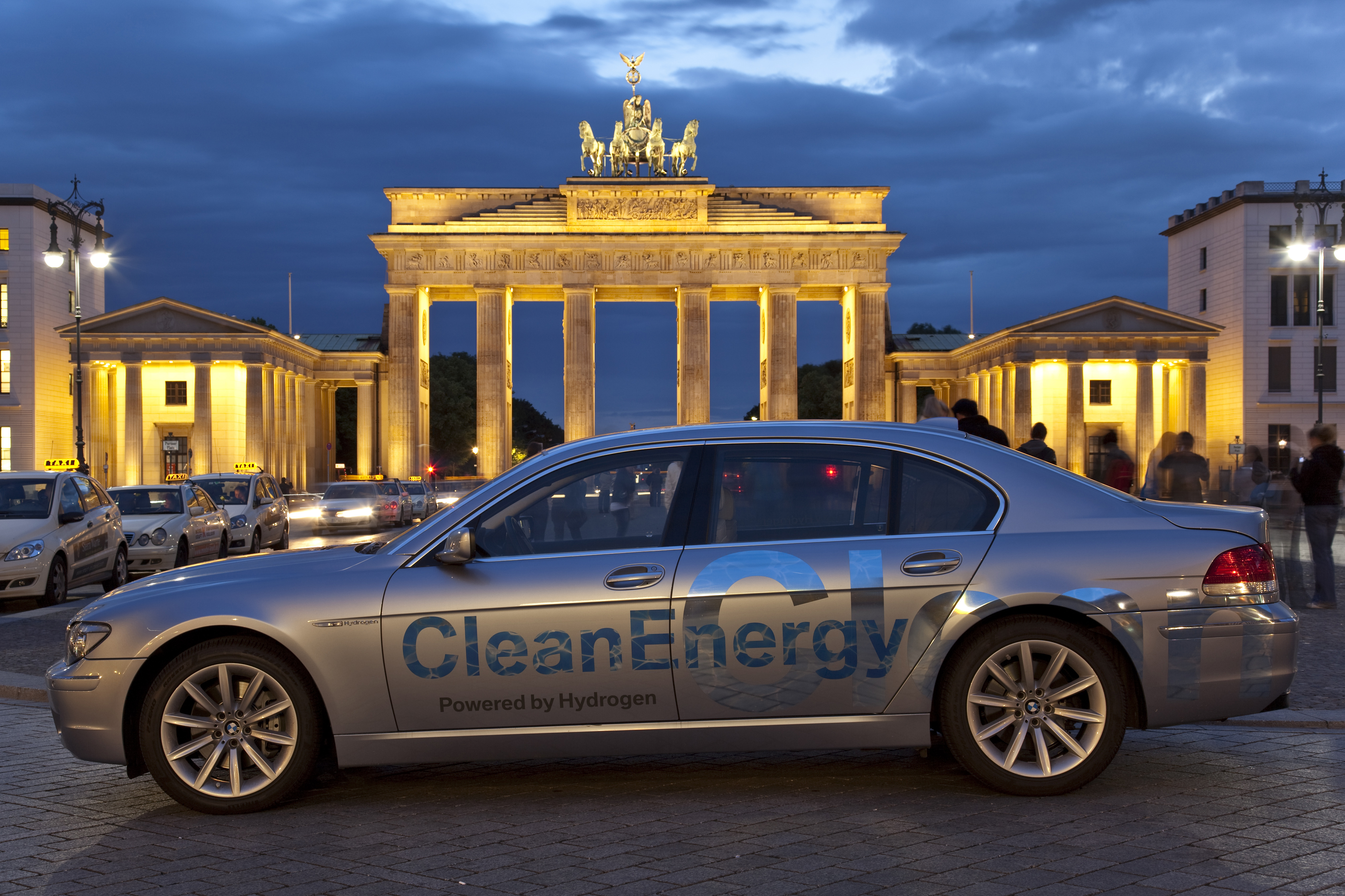 BMW Hydrogen 7 (E68), aufgenommen in Berlin, mit dem Brandenburger Tor im Hintergrund